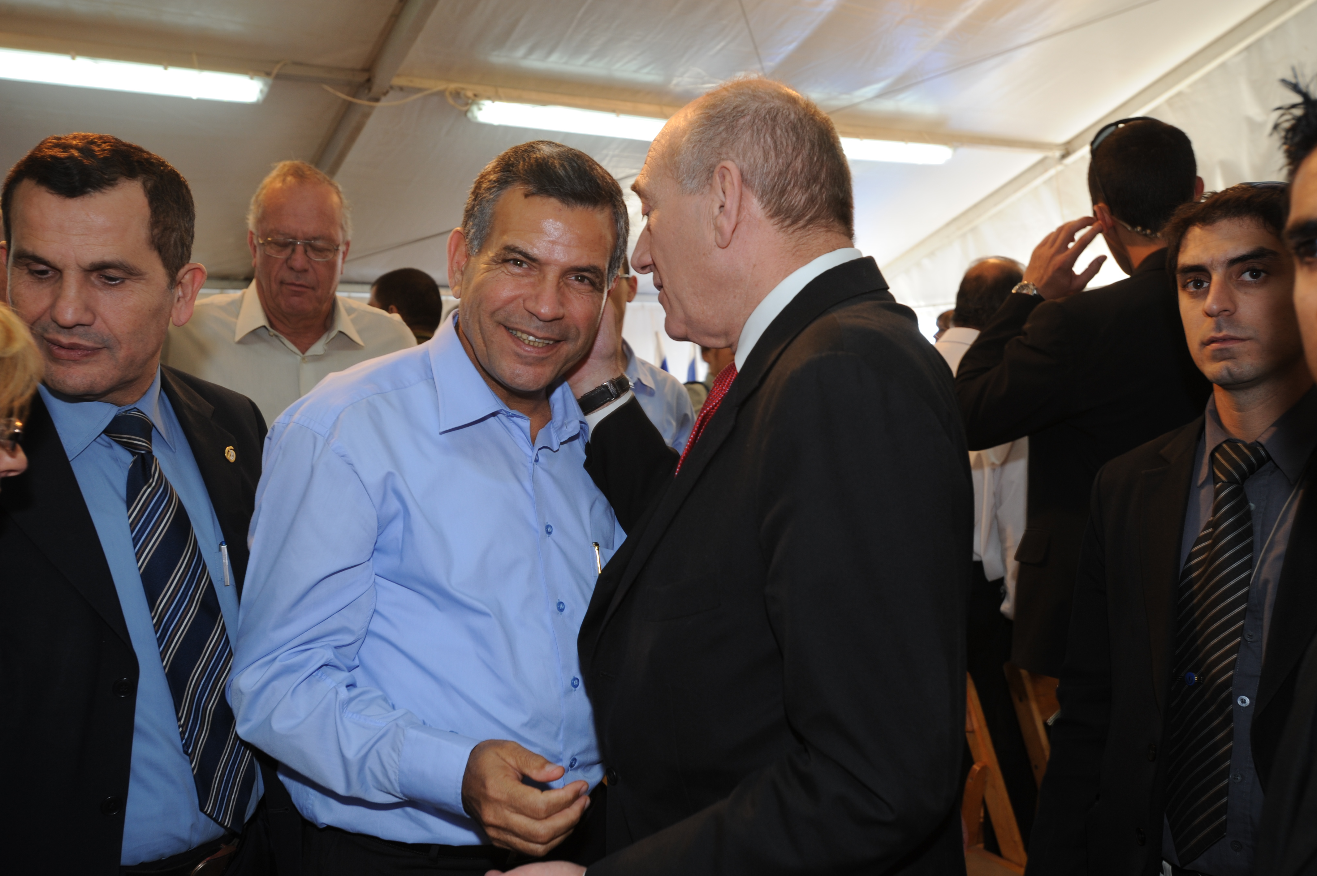 עם אהוד אולמרט בעיר הבה"דים